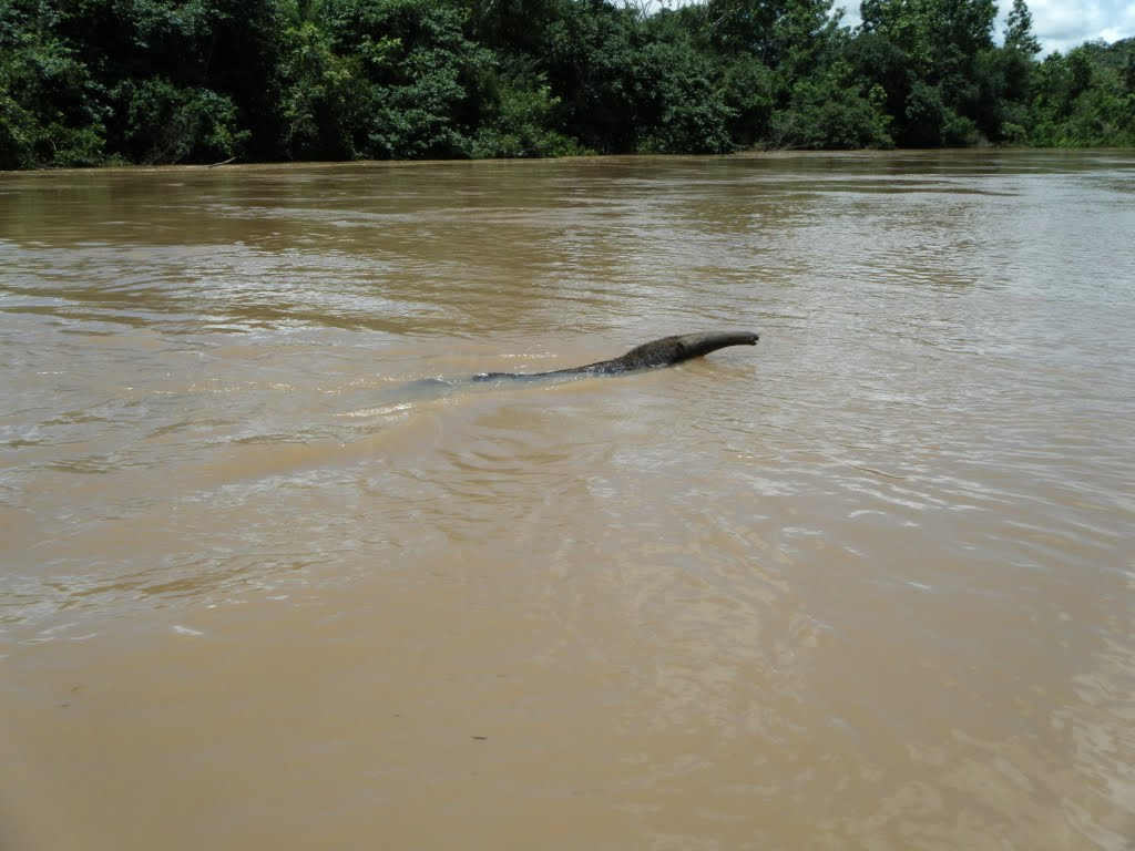 Myrmecophaga tridactyla no rio Aguapeí.